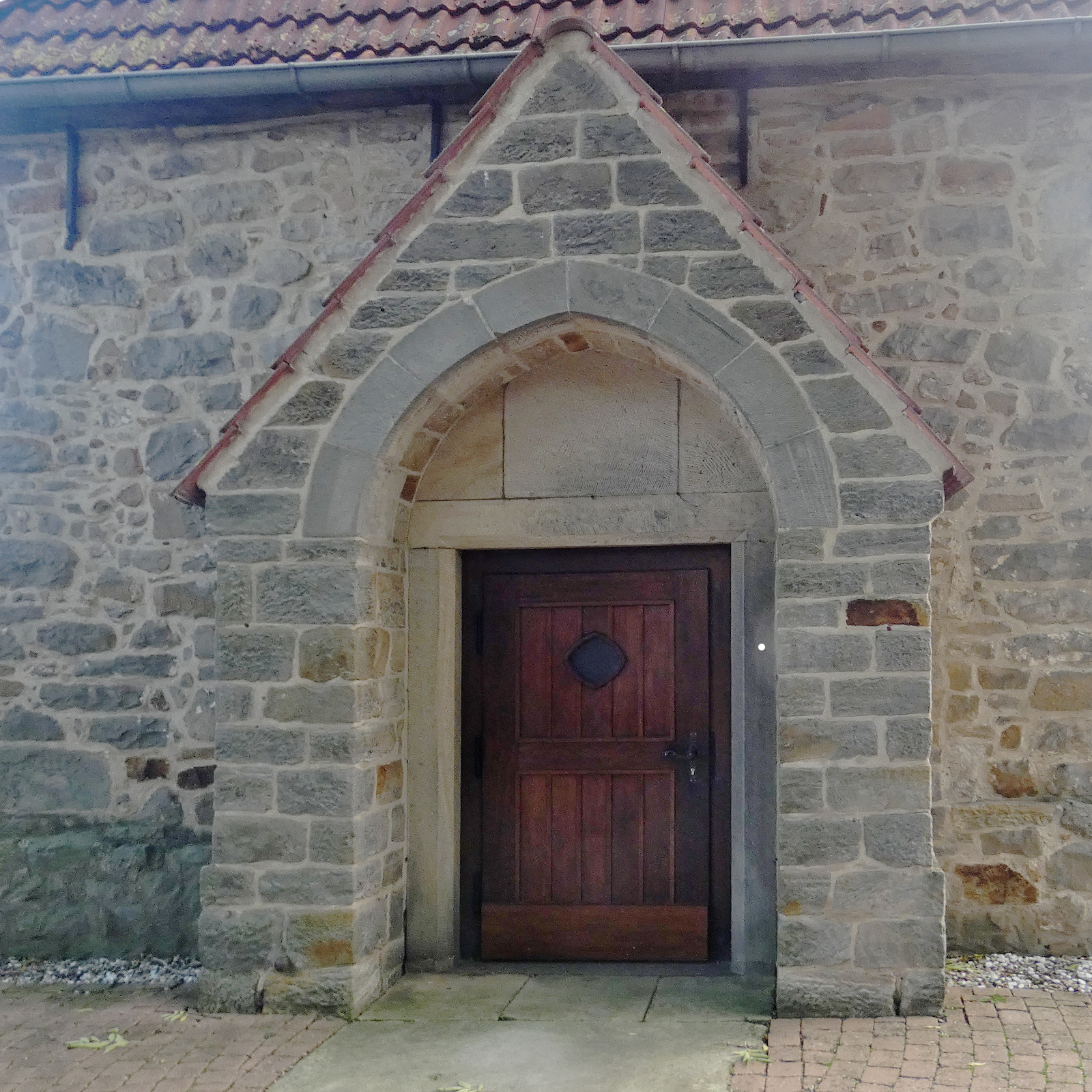 Das 1915 an der Westseite der Kapelle angebaute Portal